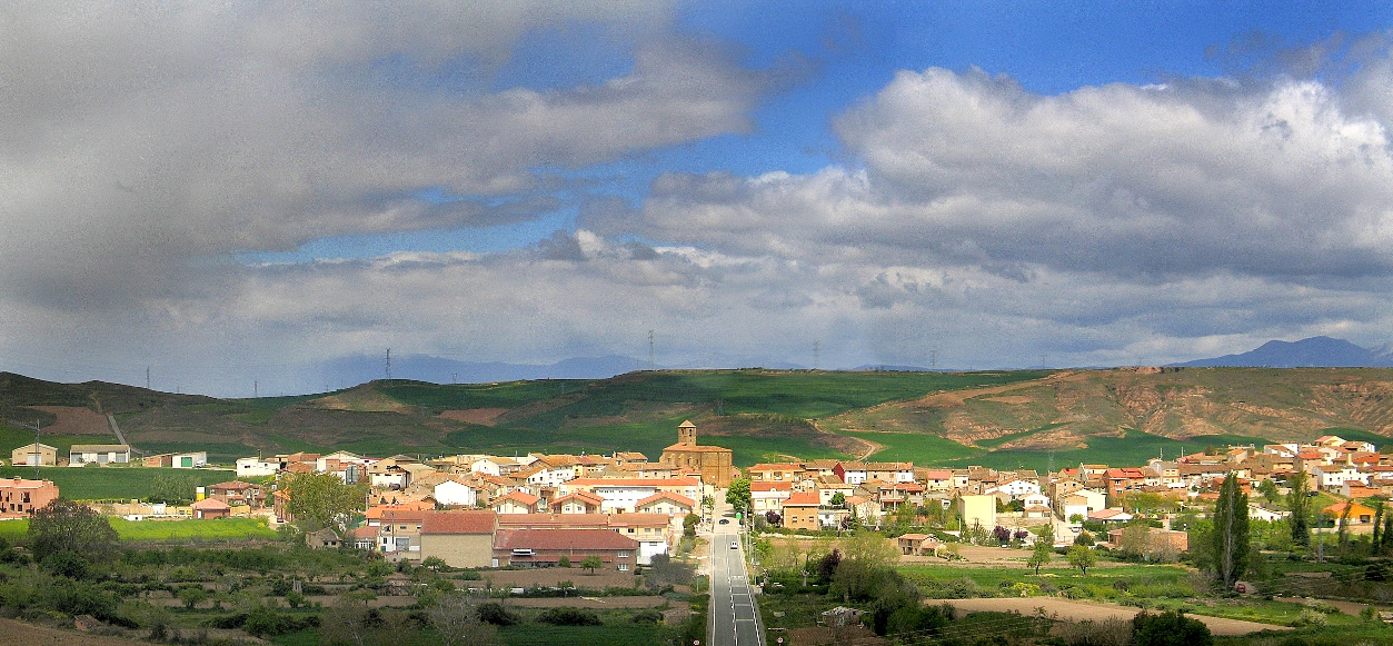 Vista de Galilea en La Rioja